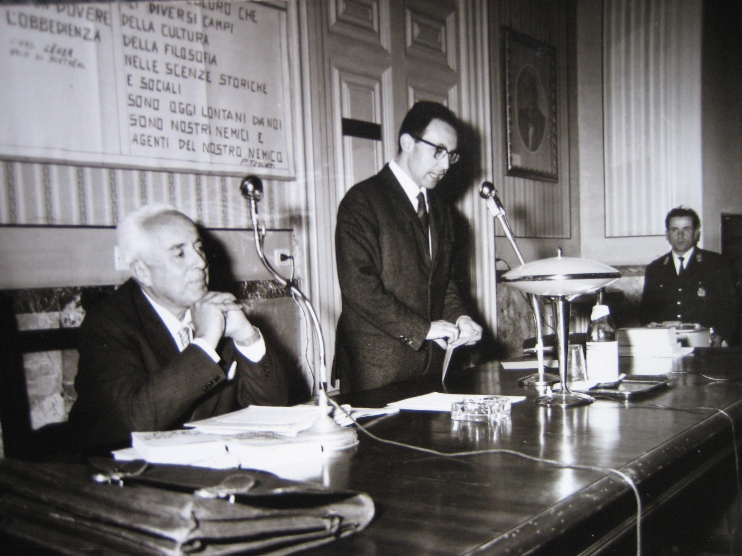 Comune di Ostuni (BR). Intervento di Girolamo de Liguori, seduto il Sen. Prof. Ambrogio Donini In occasione del convegno sul dialogo Tra Marxisti e Cattolici.